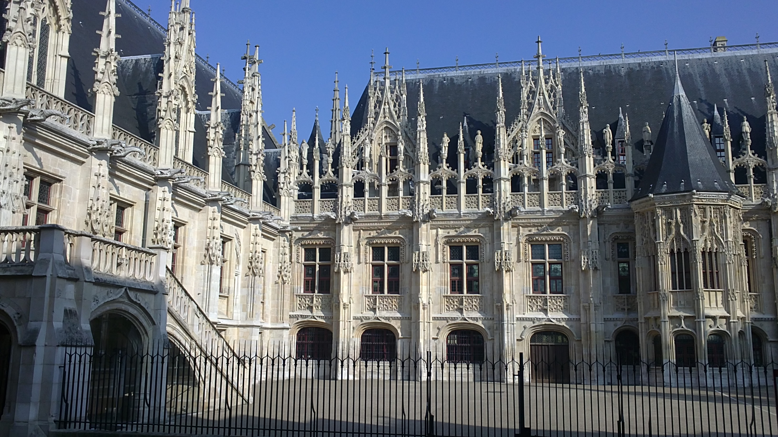 Cour du palais de justice de rouen, côté gauche